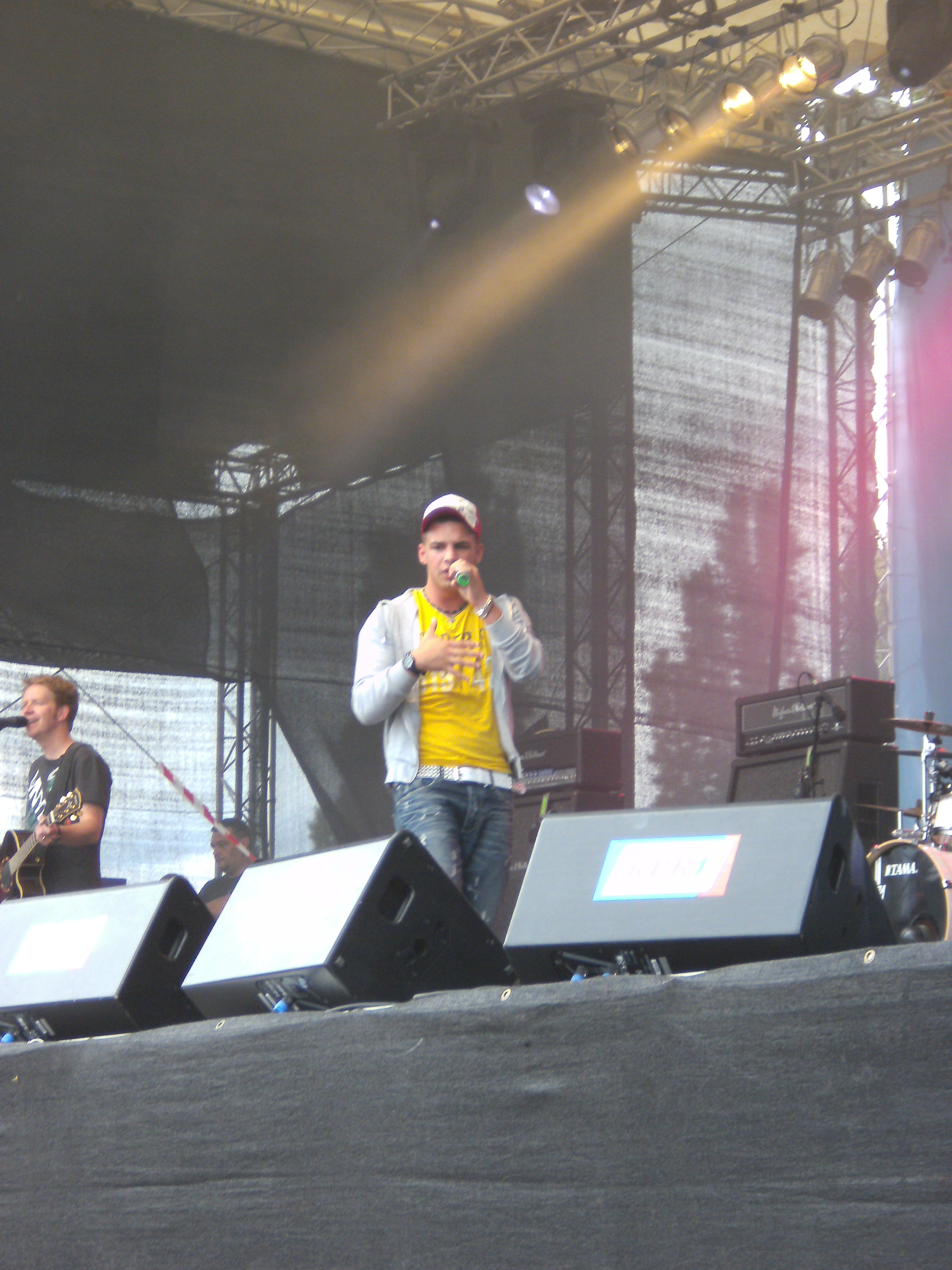 Pietro Lombardi beim RPR1 Kindertag in Bad Kreuznach